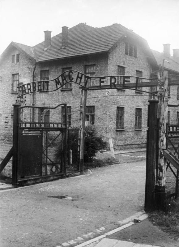 Zentralbild/Kollektiv 13.8.1955 Festivalteilnehmer besuchen ehemaliges KZ in Auschwitz Am 11.8.1955 besuchten Teilnehmer am Festival der Jugend in Warschau das ehemalige KZ in Auschwitz. Das Nazi-Konzentrationslager Auschwitz-Birkenau (Oswiecin) UBz: Eingang zum "Stammlager" Auschwitz.